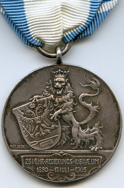 Rückseite der Regierungsjubiläumsmedaille 1905 von Schwarzburg-Sondershausen.